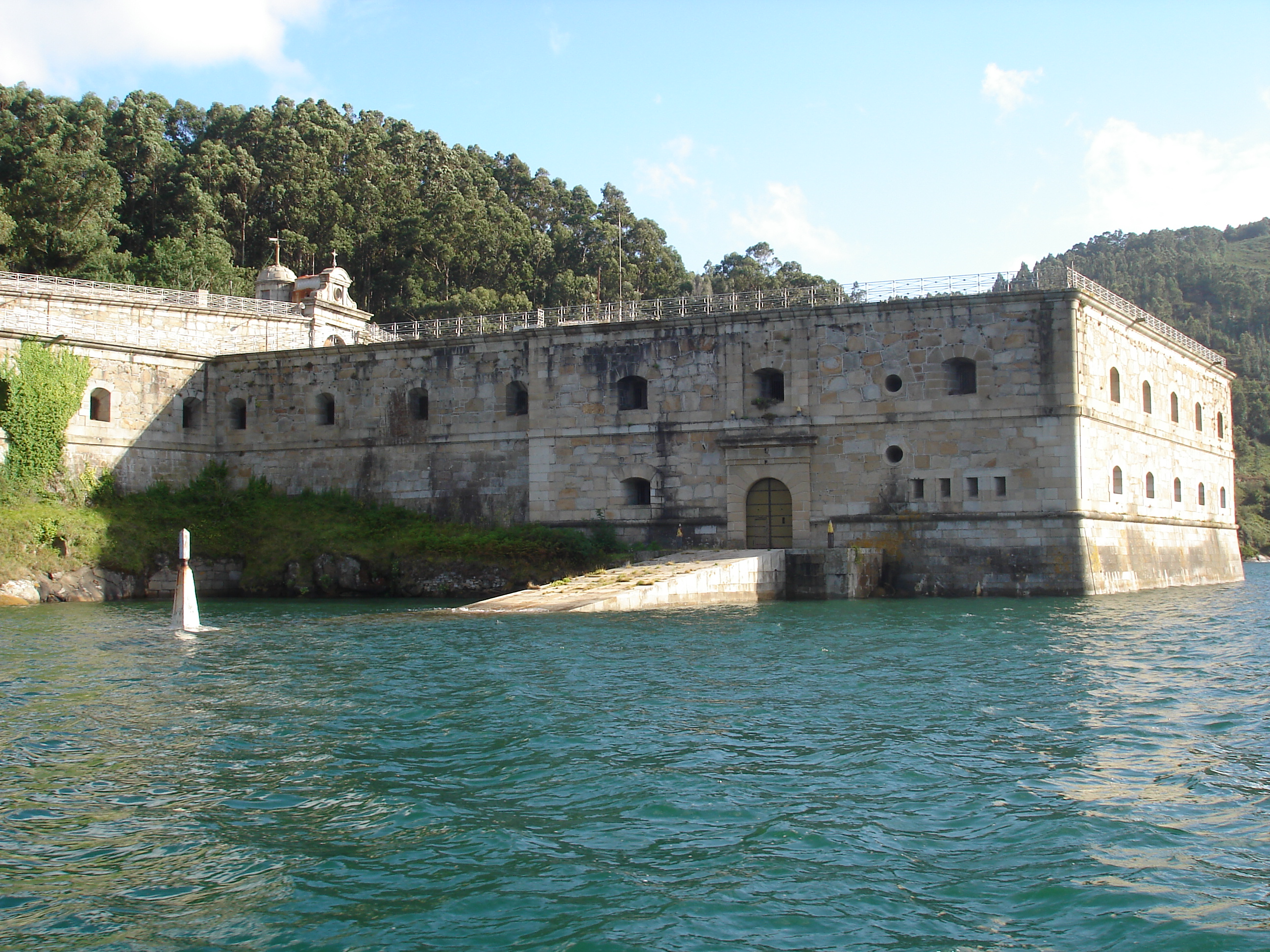 Castelo da Palma. Porta de acceso desde a ría de Ferrol